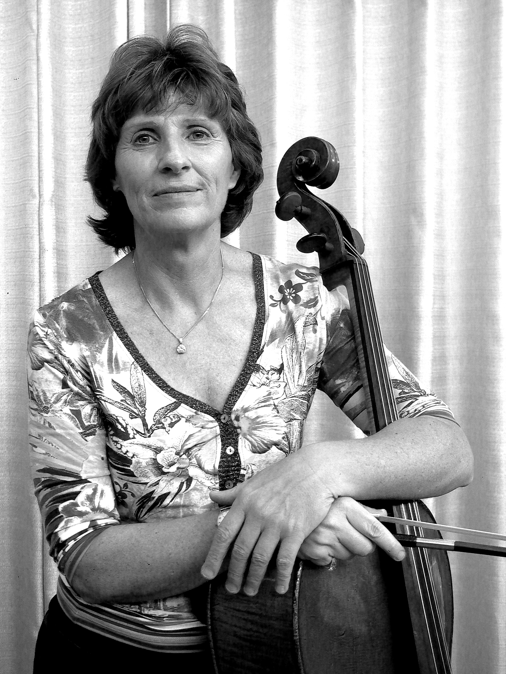 Künstlerporträt entstanden in der Philharmonie Essen